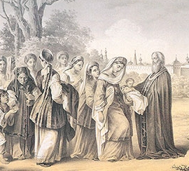 Видение прп. Сергия Радонежского великой московской княгине Софии Палеолог. Литография. Мастерская Троице-Сергиевой лавры. 1866. СПМЗ. София Палеолог. Пластическая реконструкция С.А. Никитина. Музеи Московского Кремля (ММК).